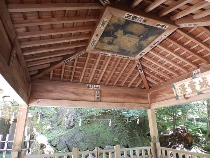 竜の絵、2019年5月23日、金城霊澤にて